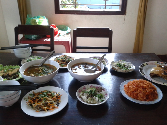 Bữa tiệc cúng đưa năm 2015